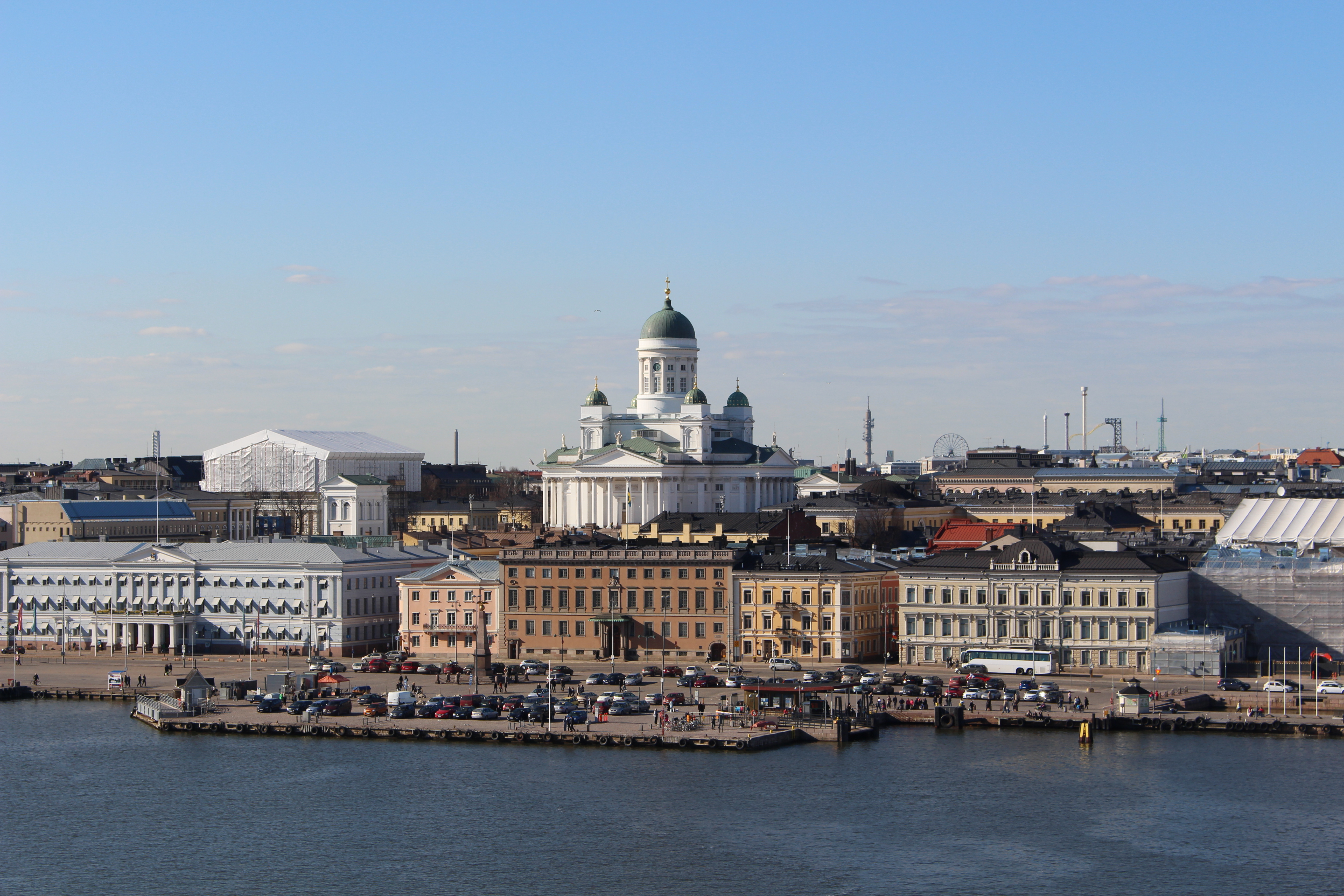 Собор Святого Николая - Кафедральный собор (Helsingin tuomiokirkko) на Сенатской площади